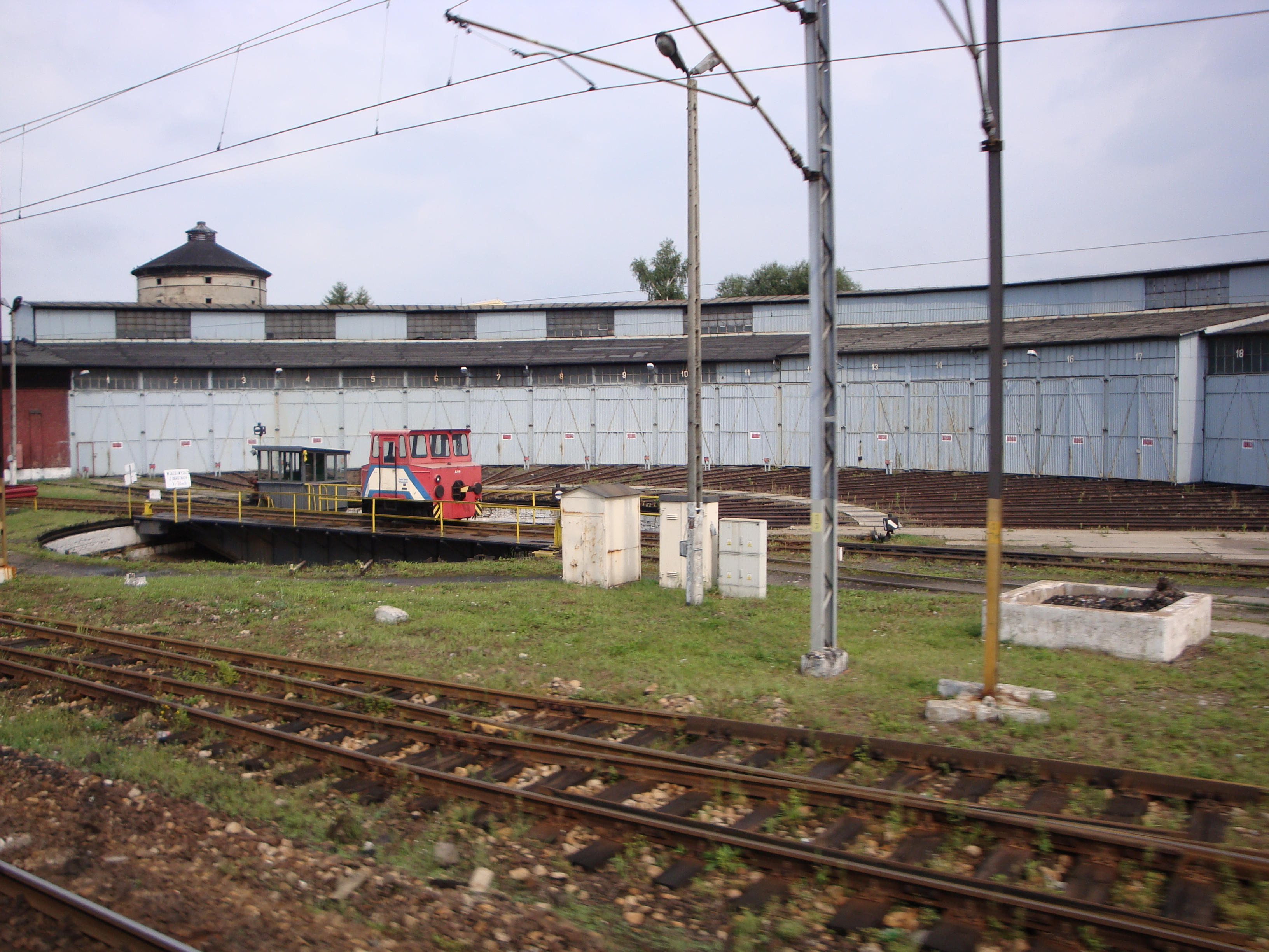 Obrotnica lokomotywowni w Katowicach.